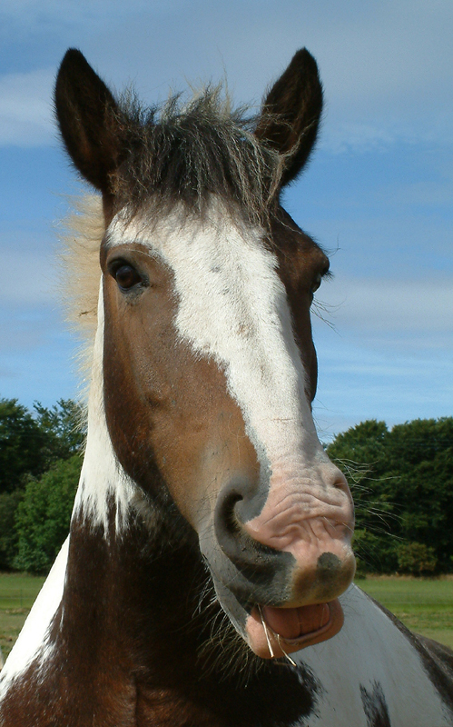 A horse